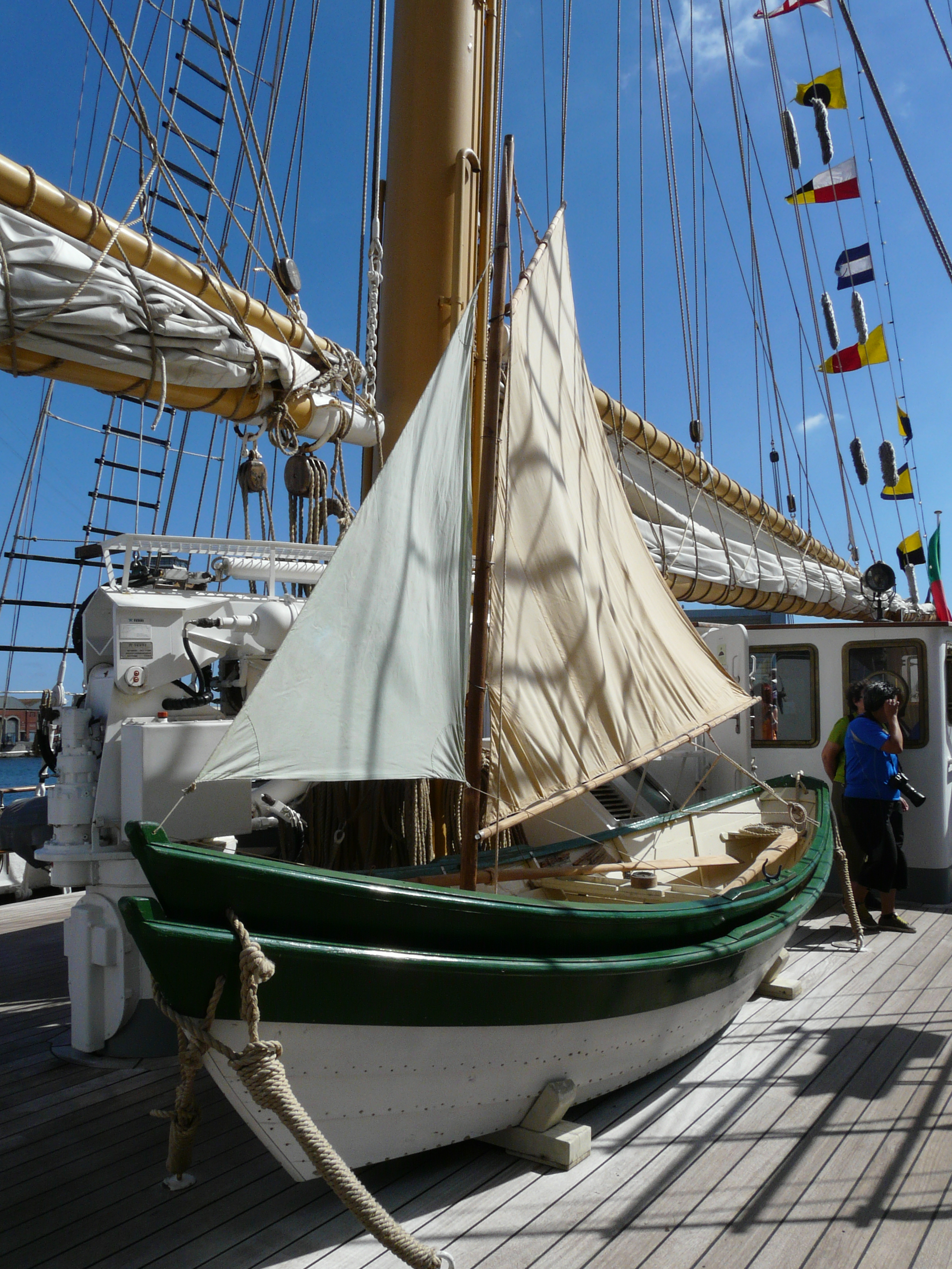 El Santa Maria Manuela atracat al Port Vell per la Mercè 2013